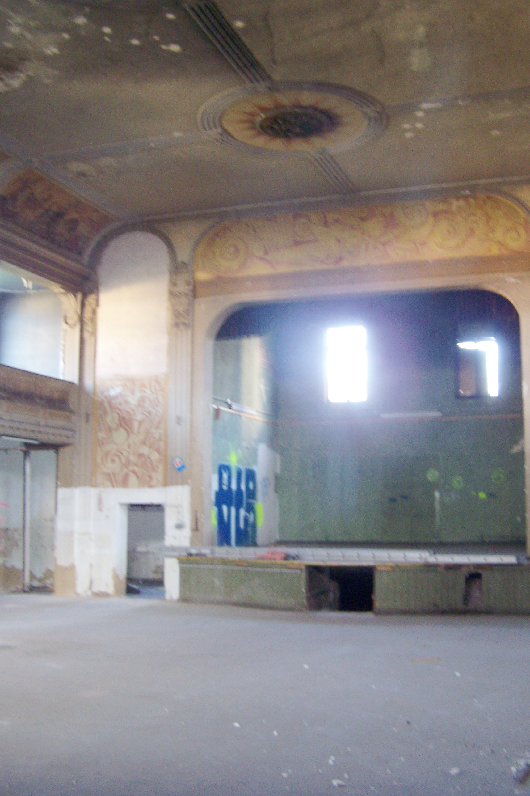 Der Tanzsaal des ehemaligen Gasthofes Stern an der Kasseler Straße wurde 1906 eingeweiht. Das mit einer Bühne und einem Rang versehene Gebäude besitzt noch ursprüngliche dezenente Jugendstilmotive aus der Gründerzeit. Wahrscheinlich in die 1920er Jahre datiert eine Neuausstattungsphase des Saales, anläßlich der die Deckenfelder, die Cornichefelder und einige Felderungen seitlich der Bühne mit orangetönigen Grisaillemalereien im Stil des Expressionismus versehen wurden. Diese zeigen neben Verzierungen auch Hinweise auf die Nutzung des Gebäudes als Gaststätte.